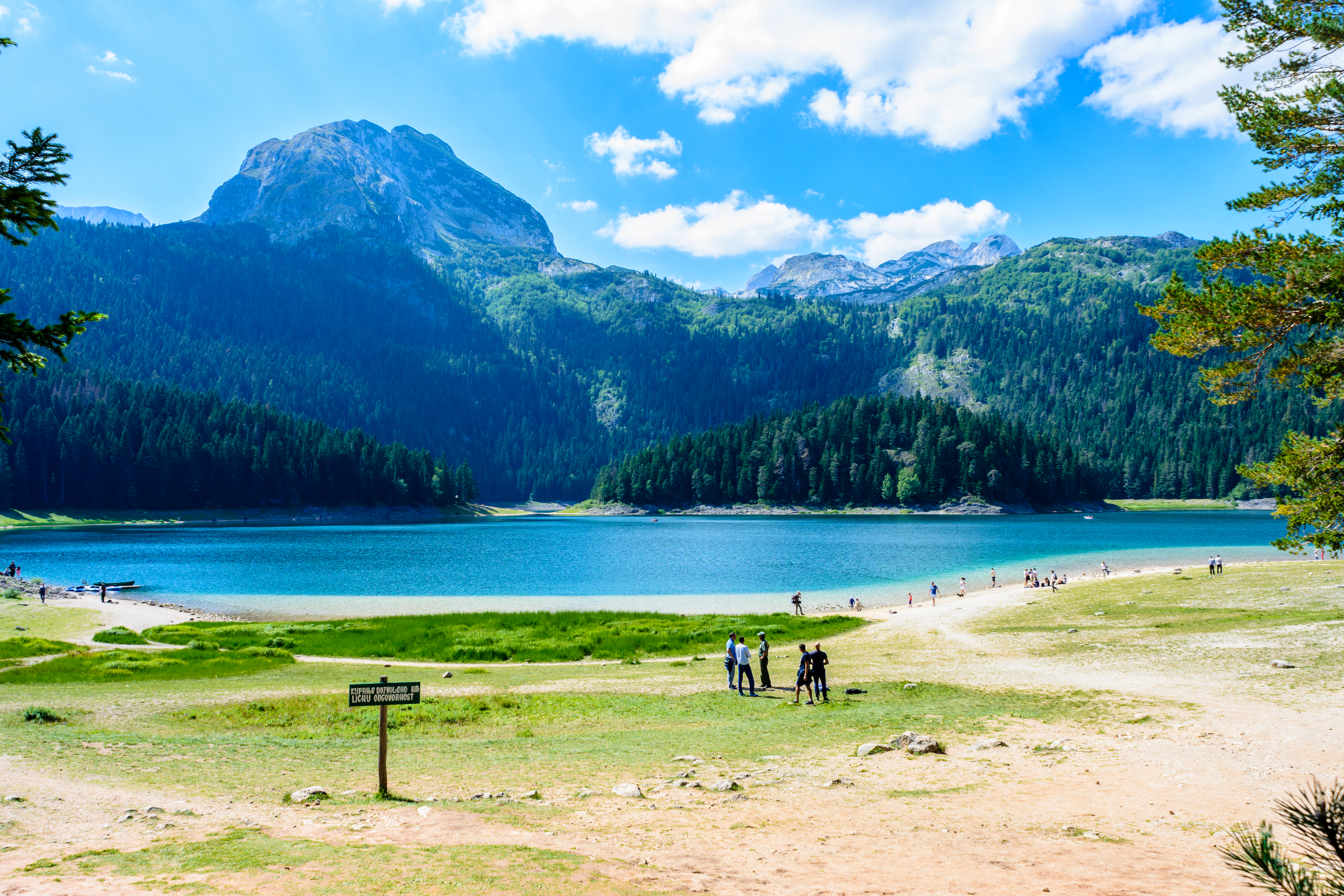 Crno Jezero